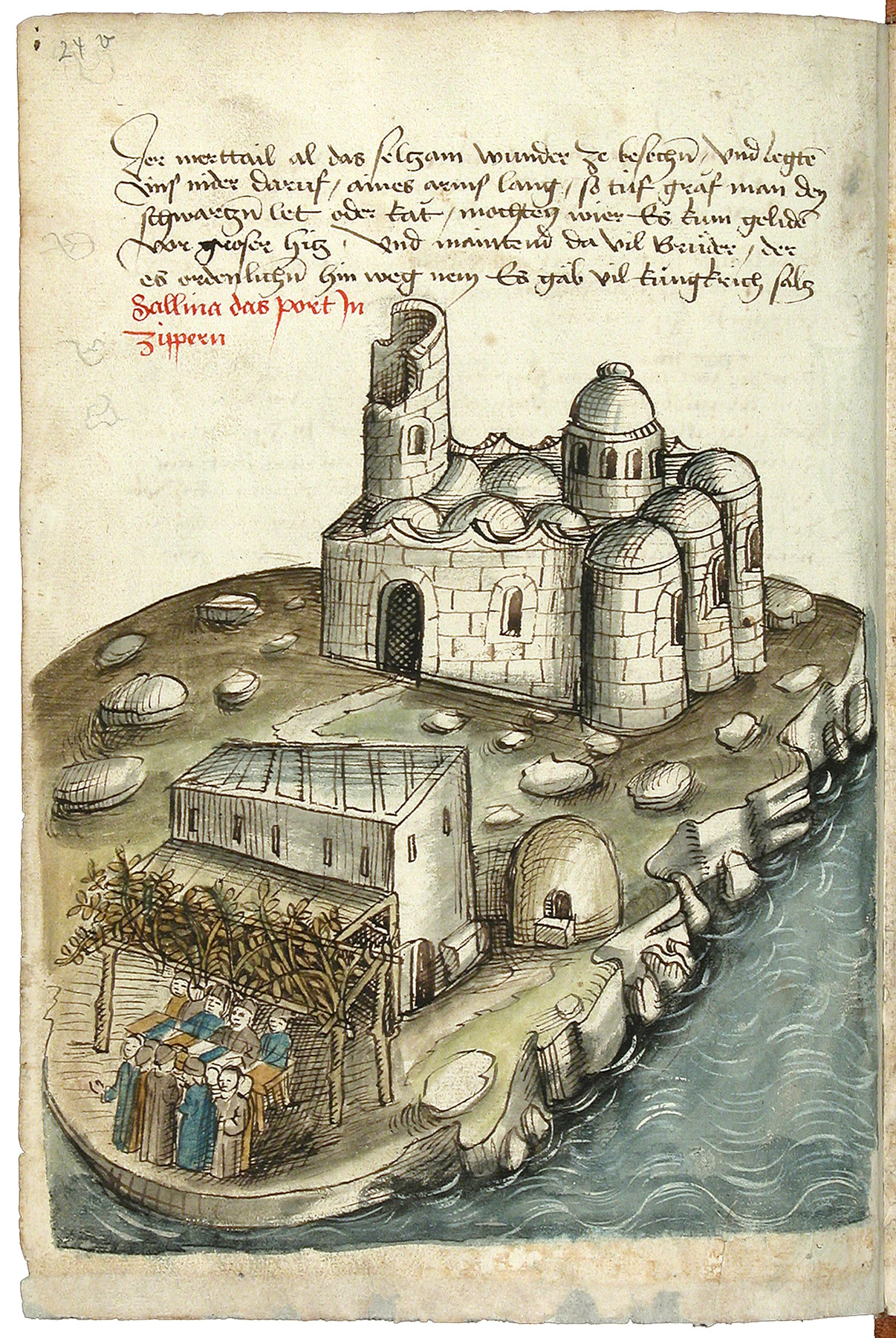 Schilderung einer Pilgerreise von Konstanz nach Jerusalem durch Konrad von Grünenberg, um 1487 Konrad von Grünenberg: Beschreibung der Reise von Konstanz nach Jerusalem - Cod. St. Peter, pap. 32. Handschrift, Bodenseegebiet (Konstanz?), um 1487. II + 53 Blätter, 32x21, mit 31 kolorierten Zeichnungen der Reiseroute von Venedig bis Palästina. Text in alemannischer Mundart.